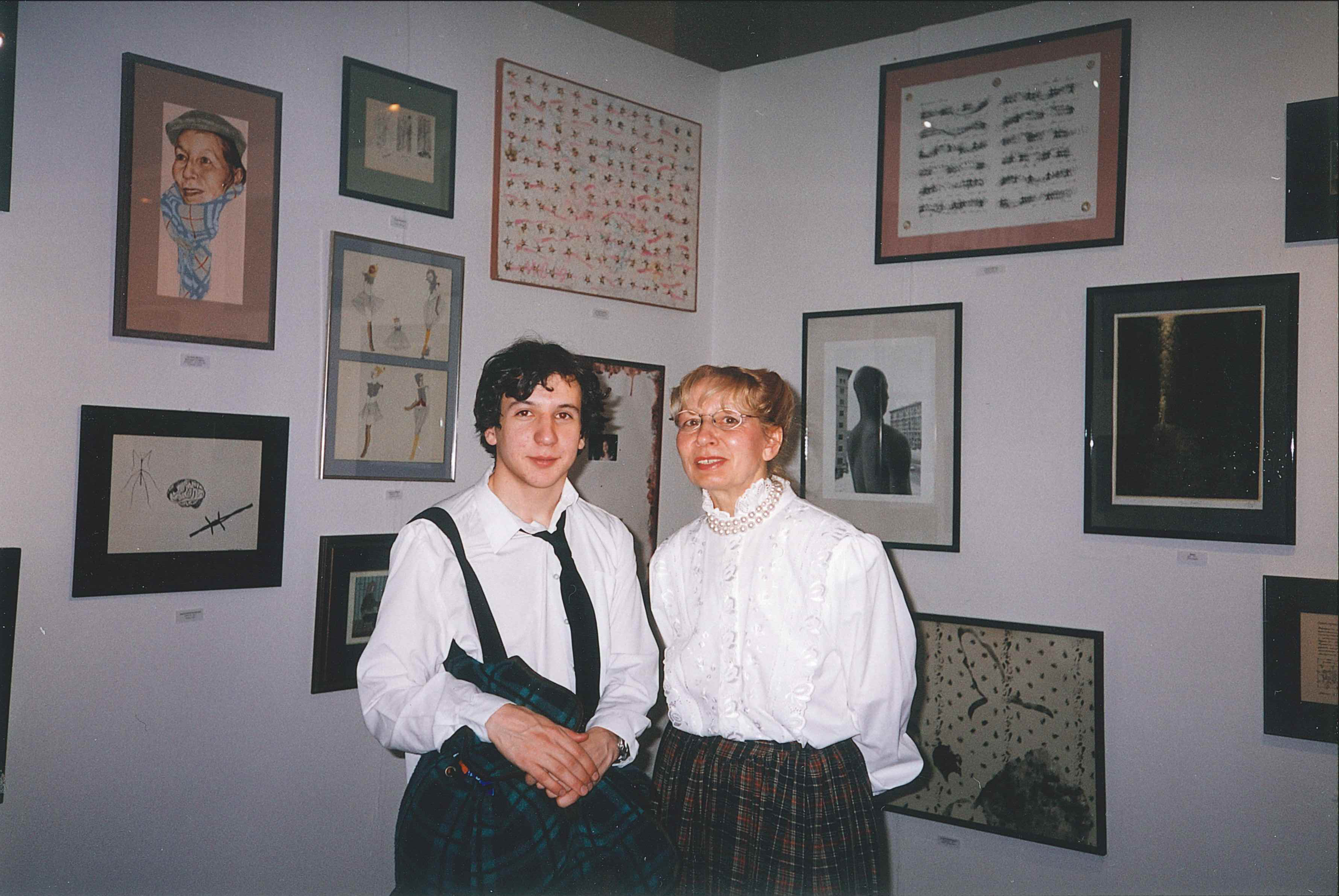 Куратор выставки "Новые русские коллекции" Петр Ширковский и коллекционер Галина Осецимская